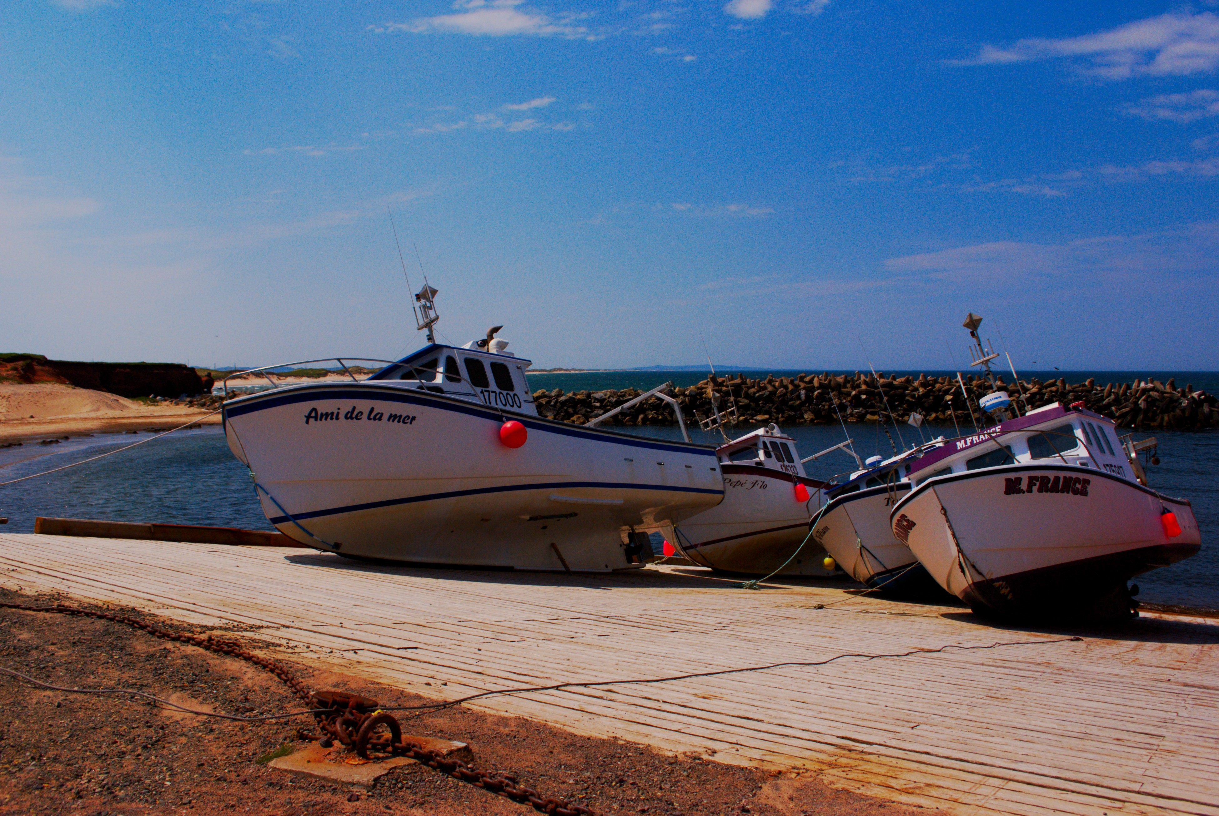 Quai de Pointe-aux-Loups aux Iles-de-la-Madeleine